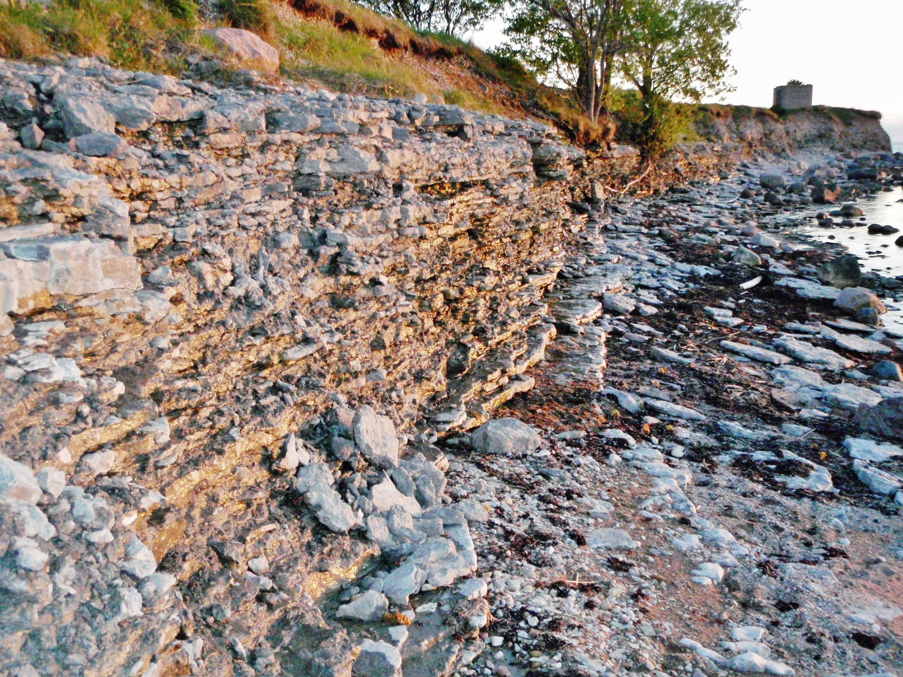 Pildistatud Sõrves. Pank on kuni 4 meetri kõrgune ja umbes 500 meetri pikkune. Koosneb lubjakivimikihtidest, mis on ka tänapäeval otseselt tormilainete poolt murrutatav. (nagu on fotolt näha) Kogu pank kuulub looduskaitse alla.